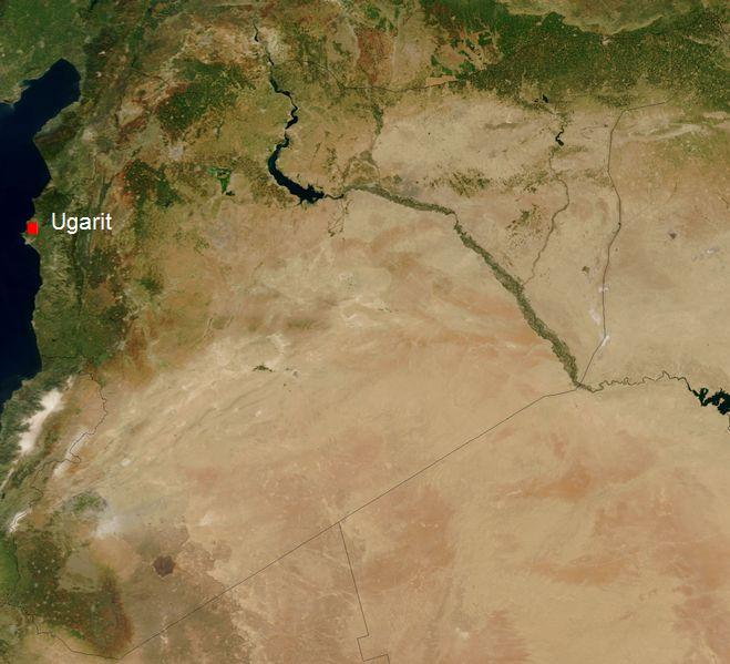 Localisation d'Ugarit.